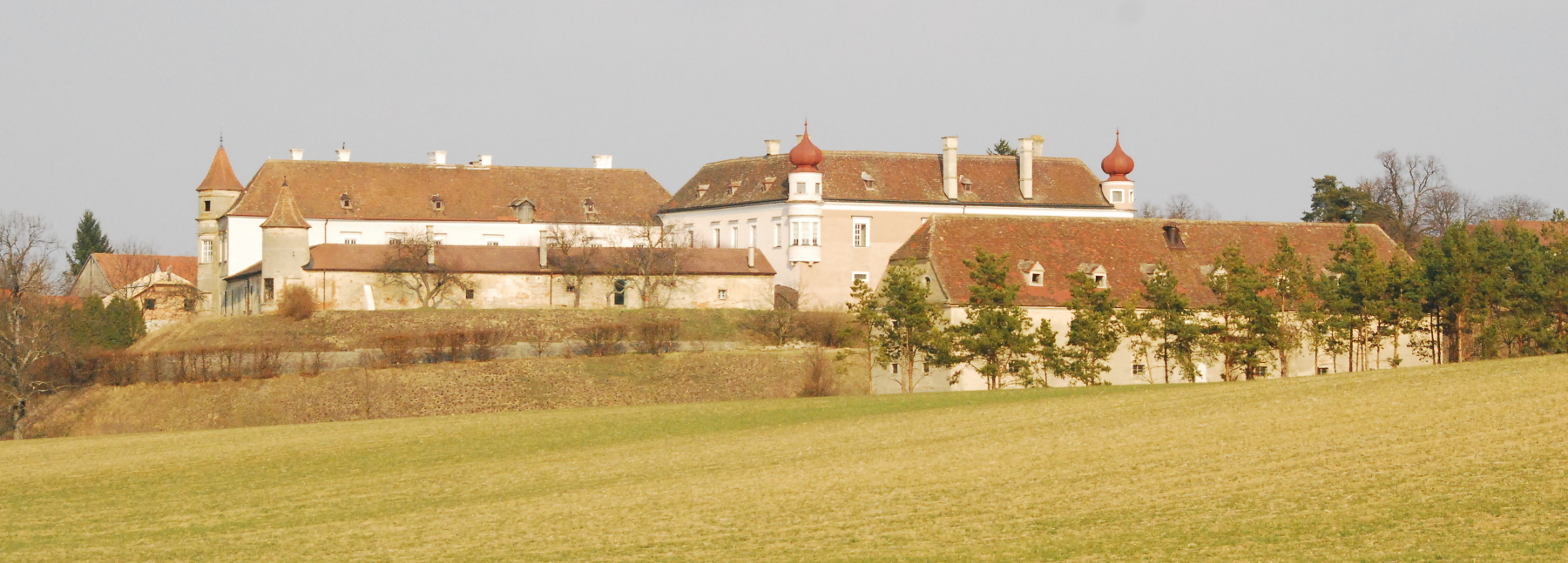 Schloss Weyerburg in Weyerburg in Niederösterreich